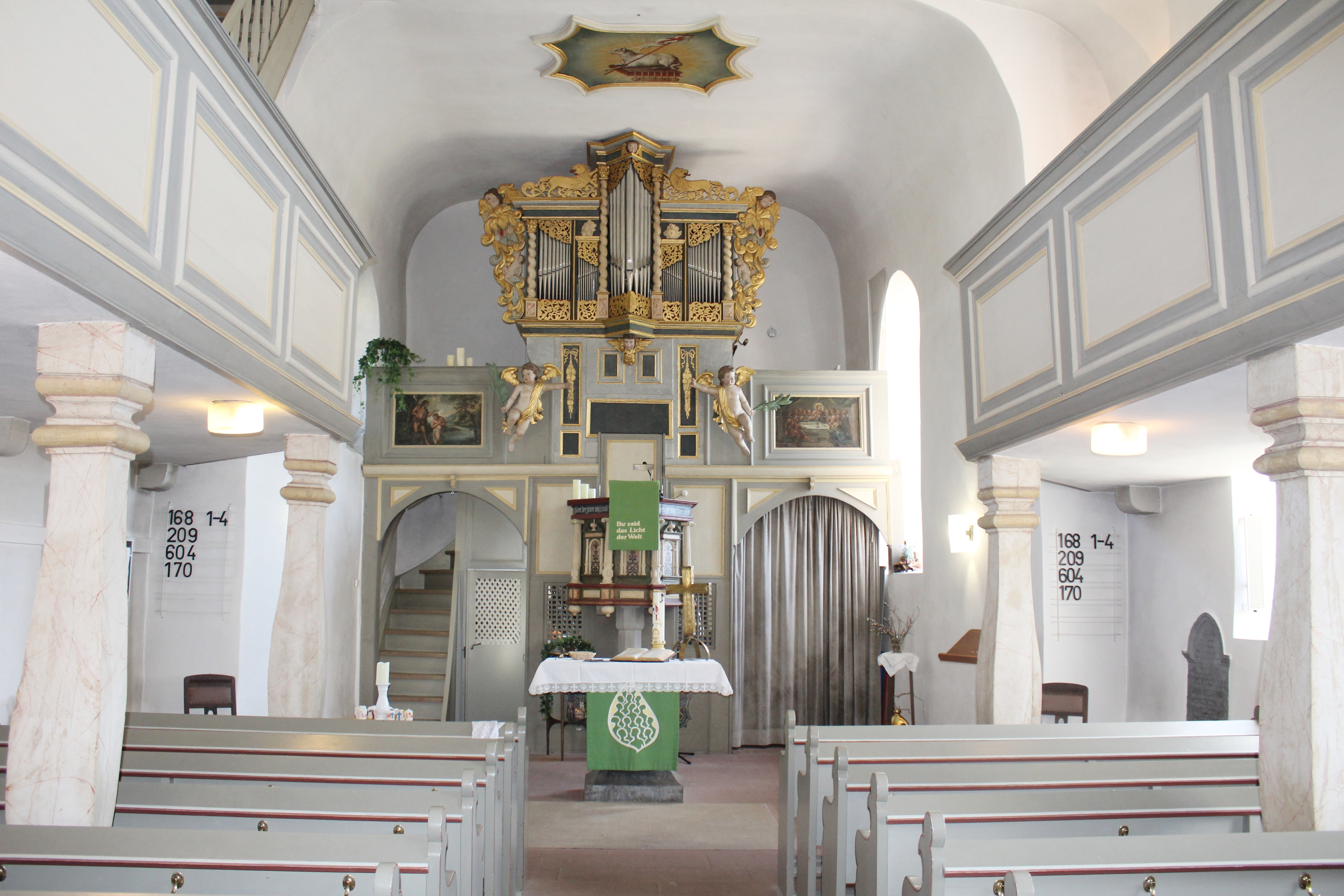 Ev. Kirche Oberbiel, Solms, Lahn-Dill-Kreis, Hessen, Deutschland